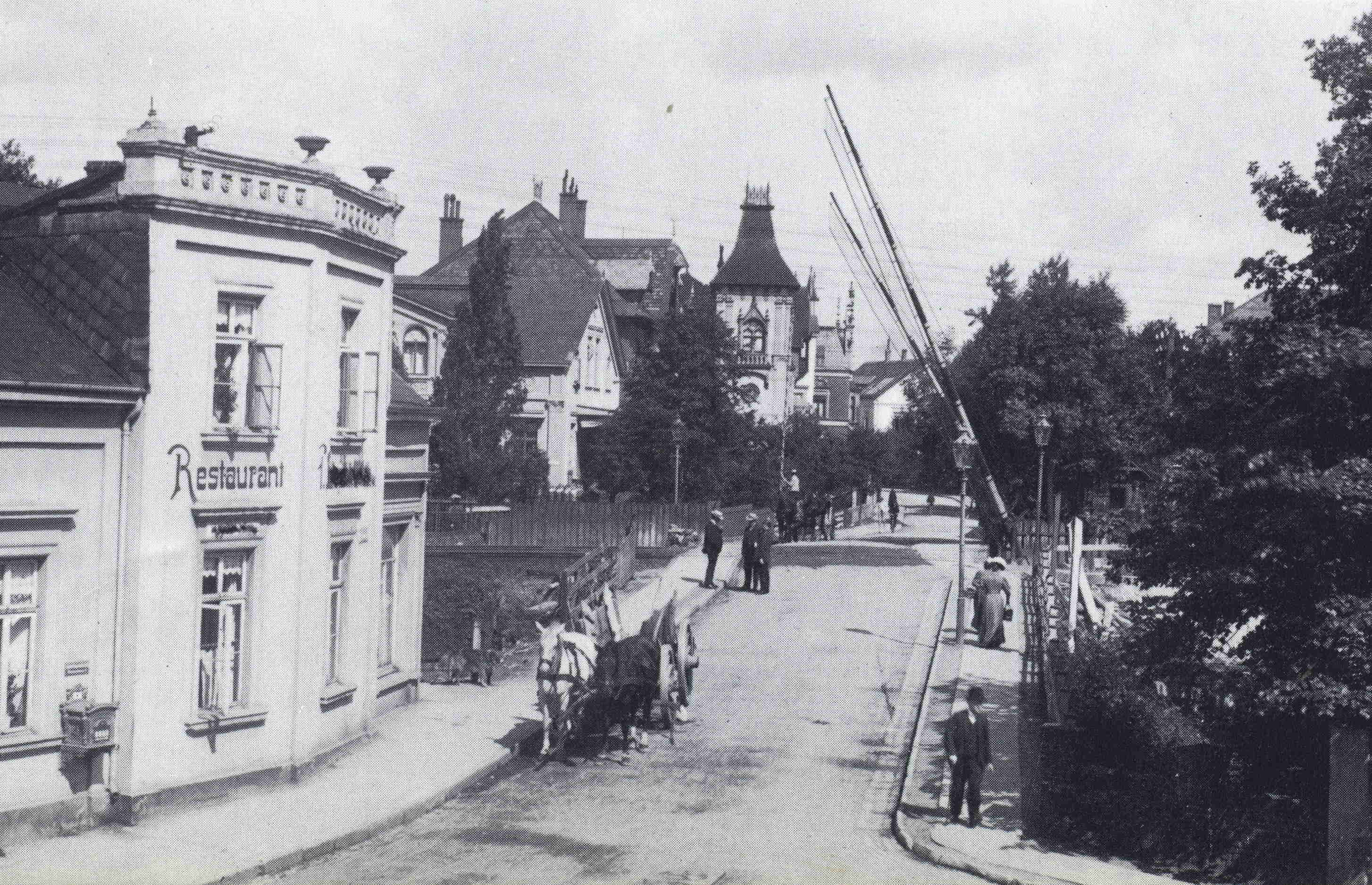 Bahnübergang des Bürgerwegs, heute Stapenhorststraße in Bielefeld über die wichtige Bahnstrecke Hamm–Minden 1908. Die Schranke alleine tat der Sicherheit genüge. Im Rahmen des viergleisigen Ausbaus der Strecke Hamm–Minden wurde der Bahnübergang 1910 durch eine Unterführung ersetzt.[1]. Die erwogene Anlage einer Straßenbahn kam wegen des Ersten Weltkriegs und den Wirtschaftskrisen der Zwischenkriegszeit nicht zustande.